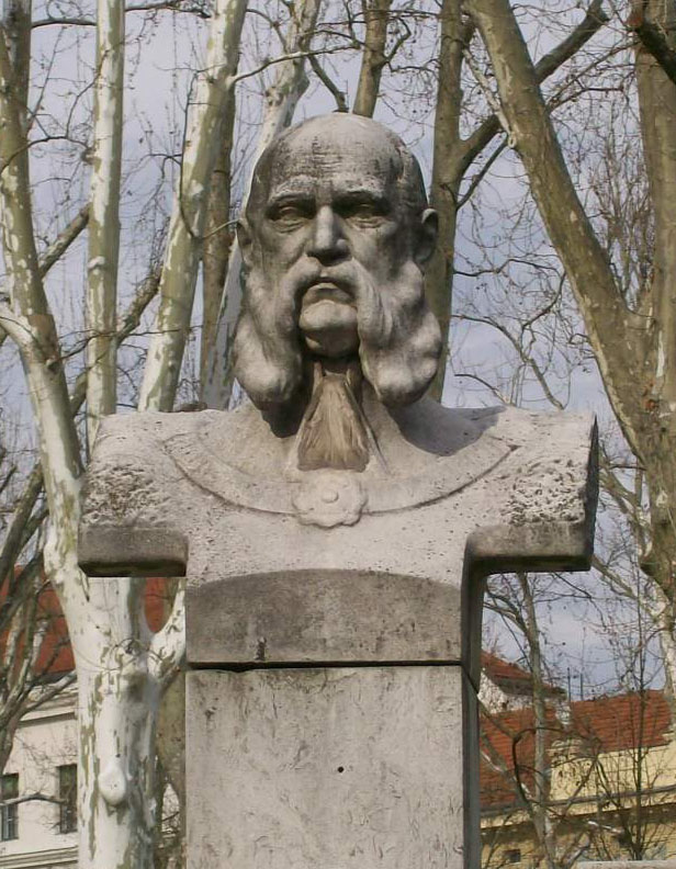 Spomenik Ivanu Mažuraniću na Zrinjevcu, Zagreb